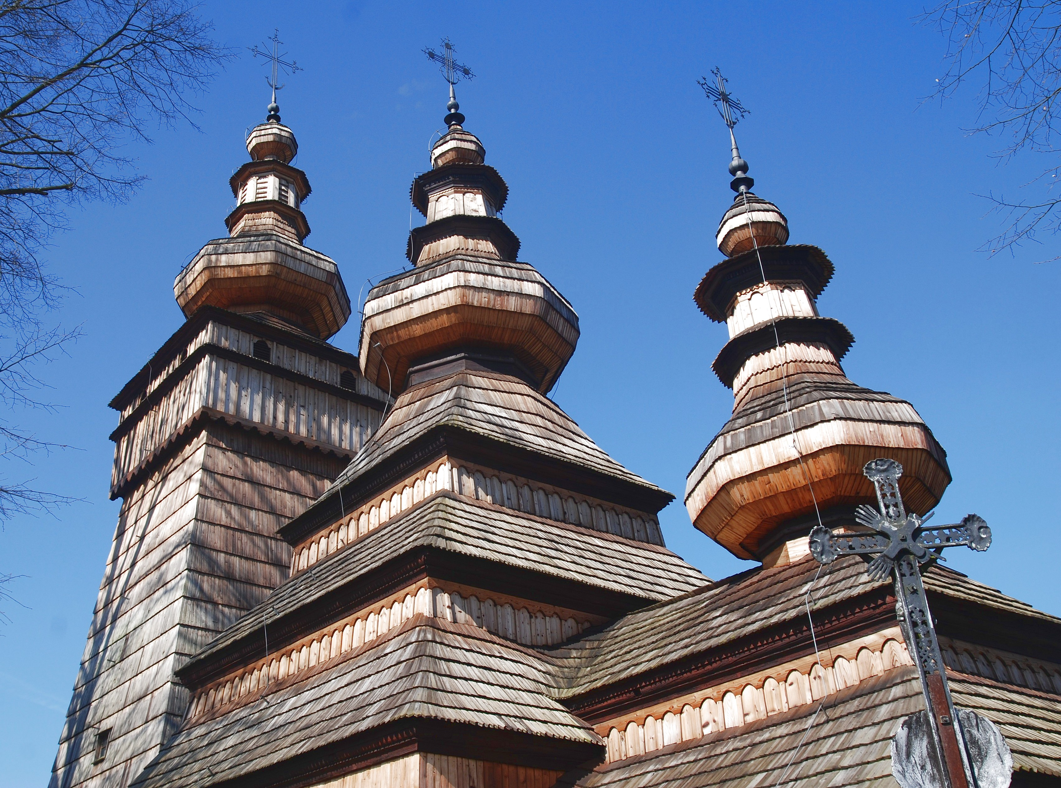 wieś Kwiatoń